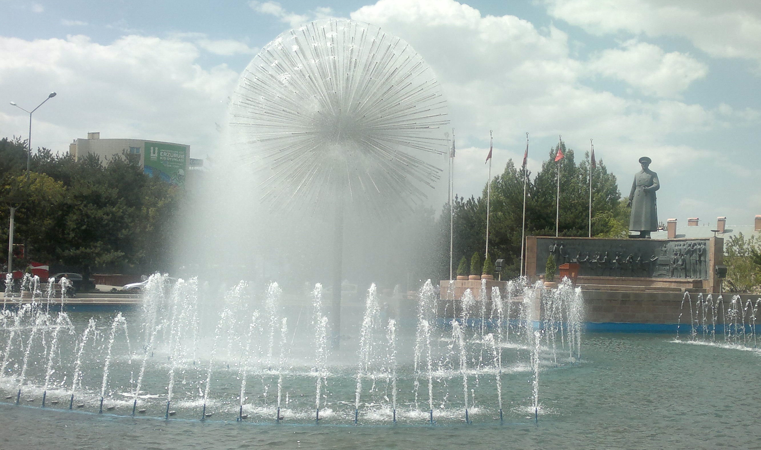 Türkiye'nin Doğu Anadolu Bölgesi'ndeki en büyük ve en kalabalık şehri Erzurum'dan şehir görüntüsü.